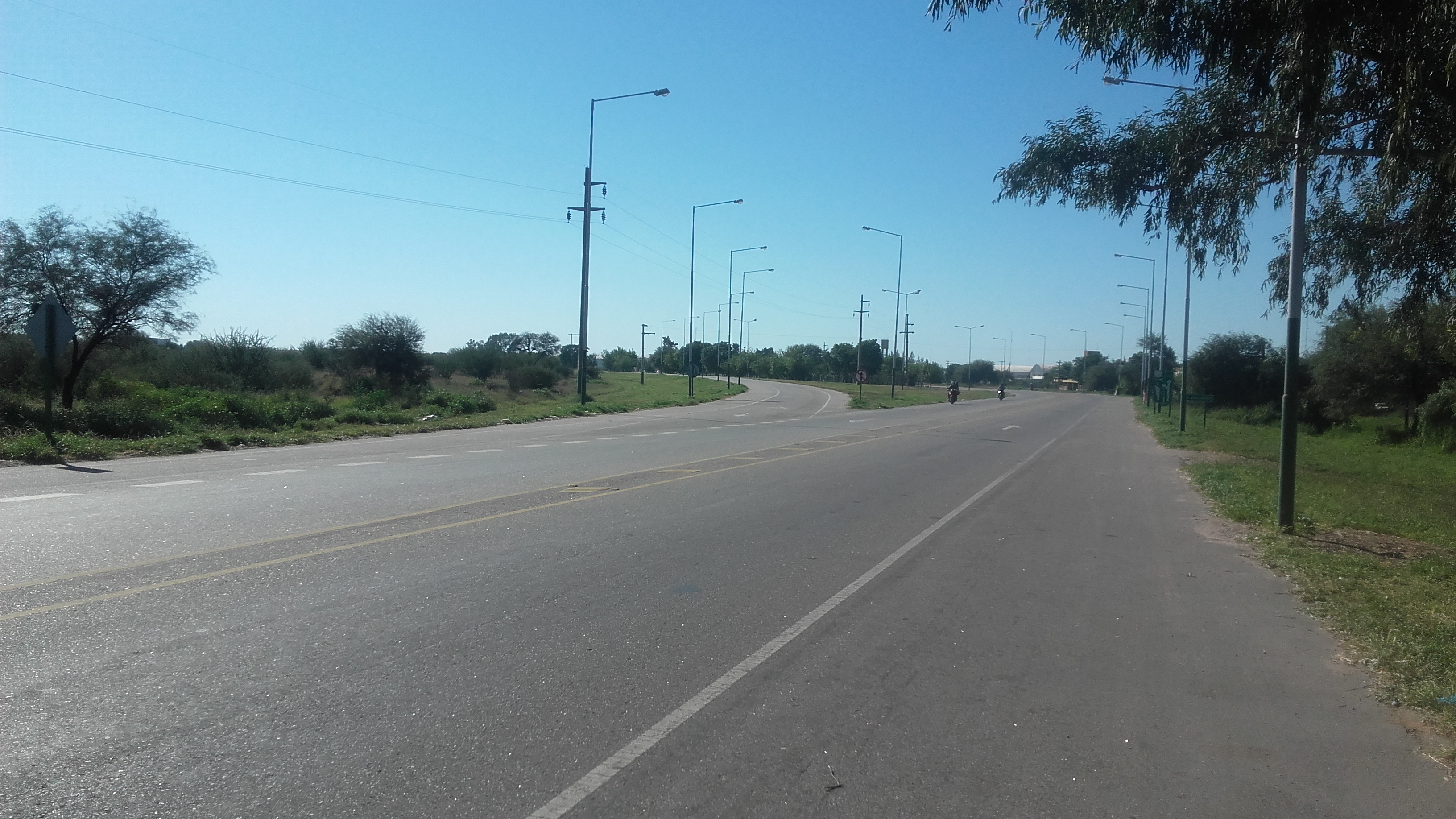 Ruta de ingreso a Aeropuerto Capitán Vicente Almandos Almonacid.